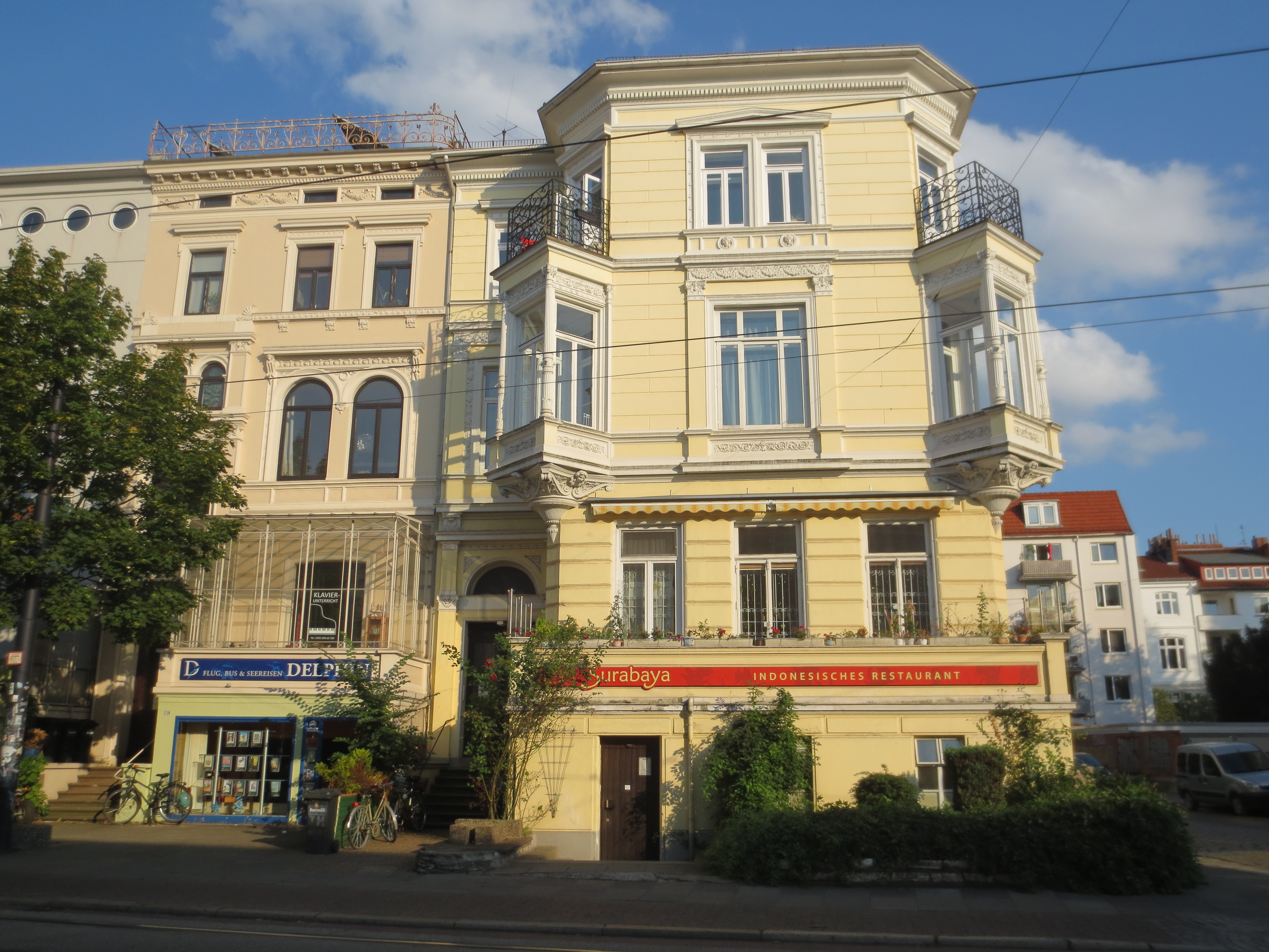 Wohnhausgruppe in Bremen, Am Dobben 114Die Denkmalgruppe ist ein geschütztes Kulturdenkmal in der Freien Hansestadt Bremen, mit der Nr. 0061 beim Landesamt für Denkmalpflege registriert.